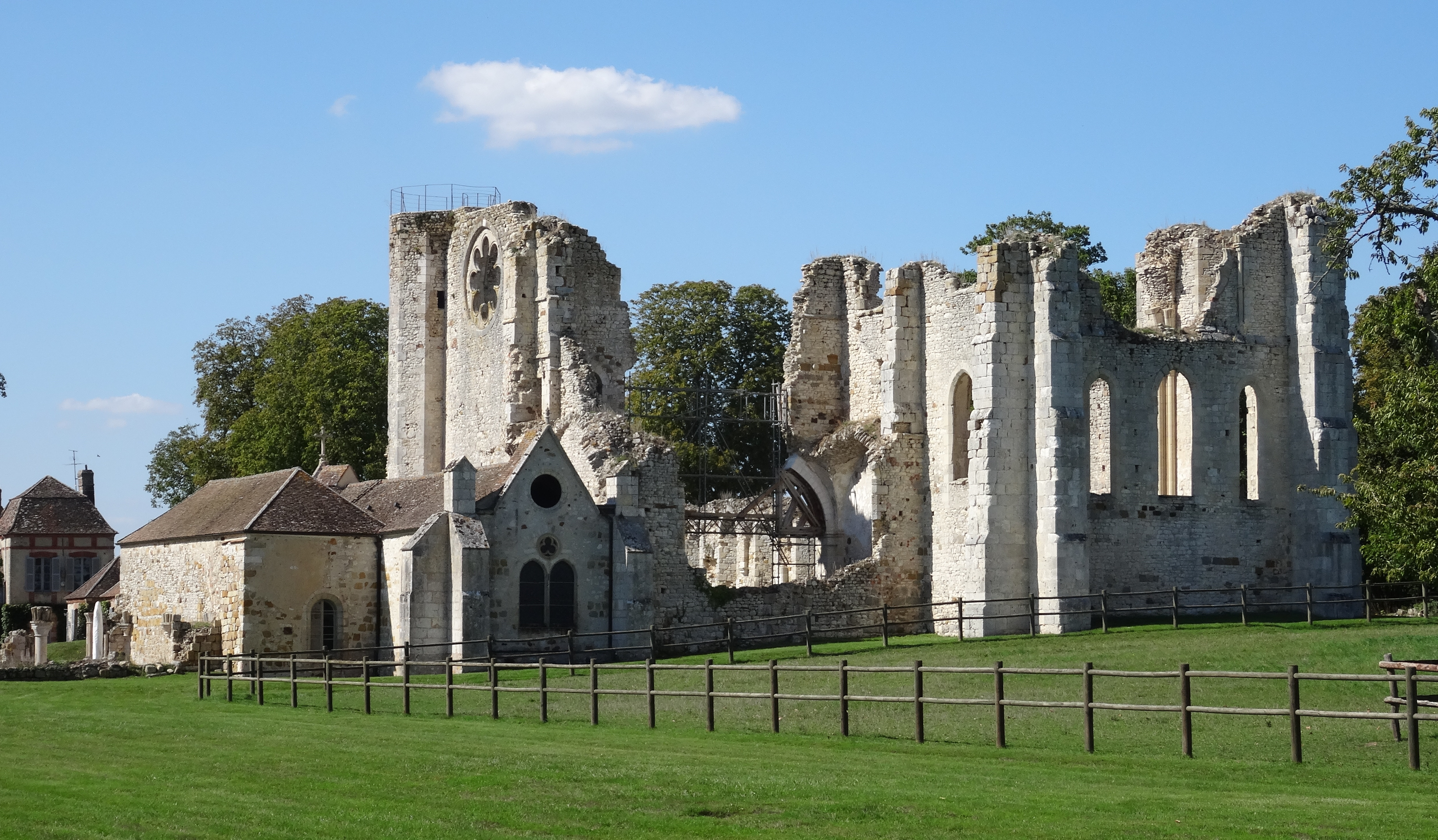 Abbaye de Preuilly (commune d'Égligny, Seine-et-Marne, région Île-de-France).